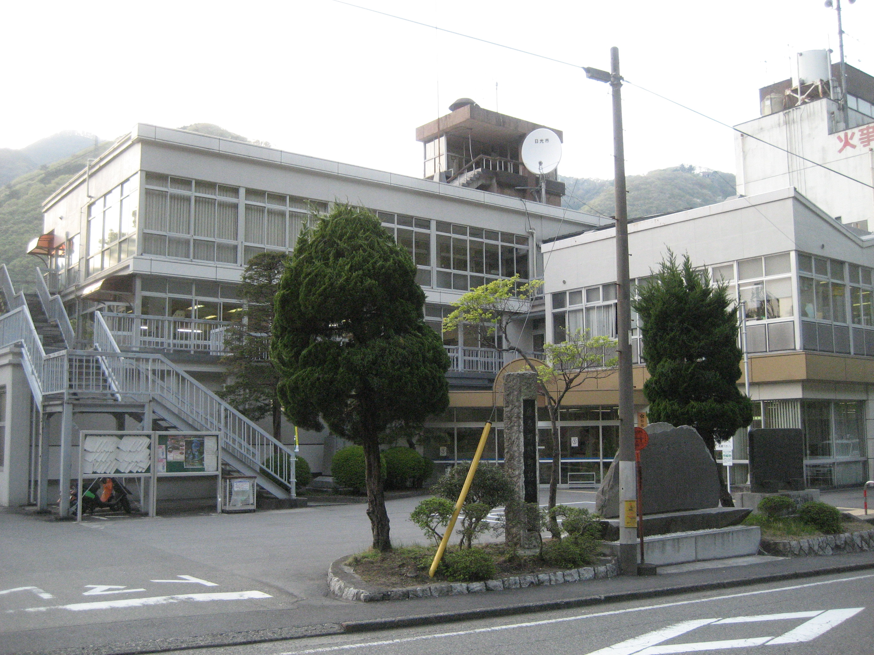 栃木県日光市役所藤原総合支所庁舎（旧藤原町役場）